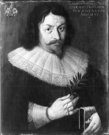 Prof. Carl Bardili (Tübinger Professorengalerie)